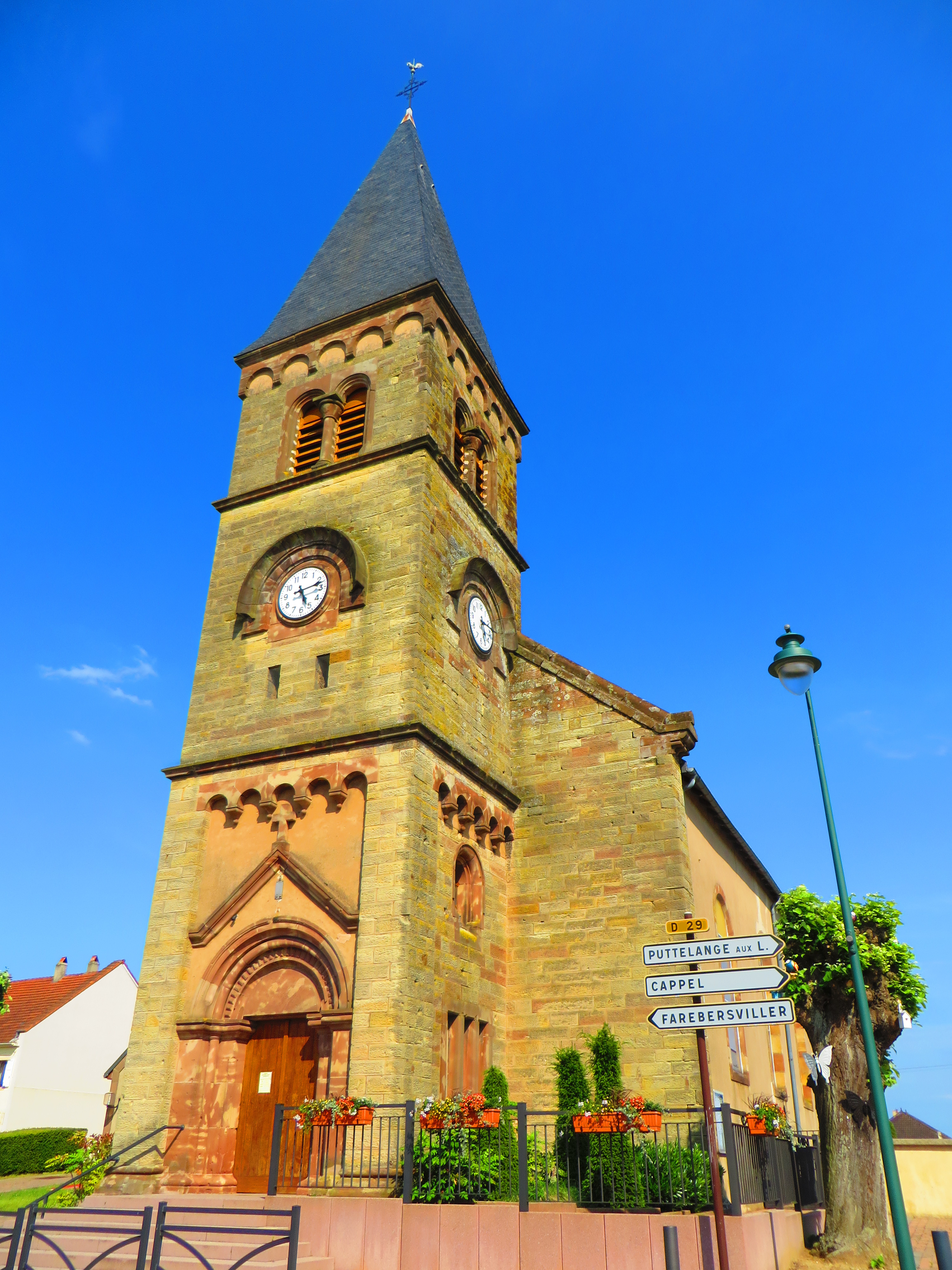 Henriville eglise